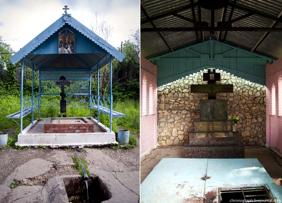 Два родника - слева во имя иконы Божьей Матери "Всецарица" и справа - во имя основателей русского монашества святых Антония и Феодосия. Большая Рязань. Ставропольский район Самарской области